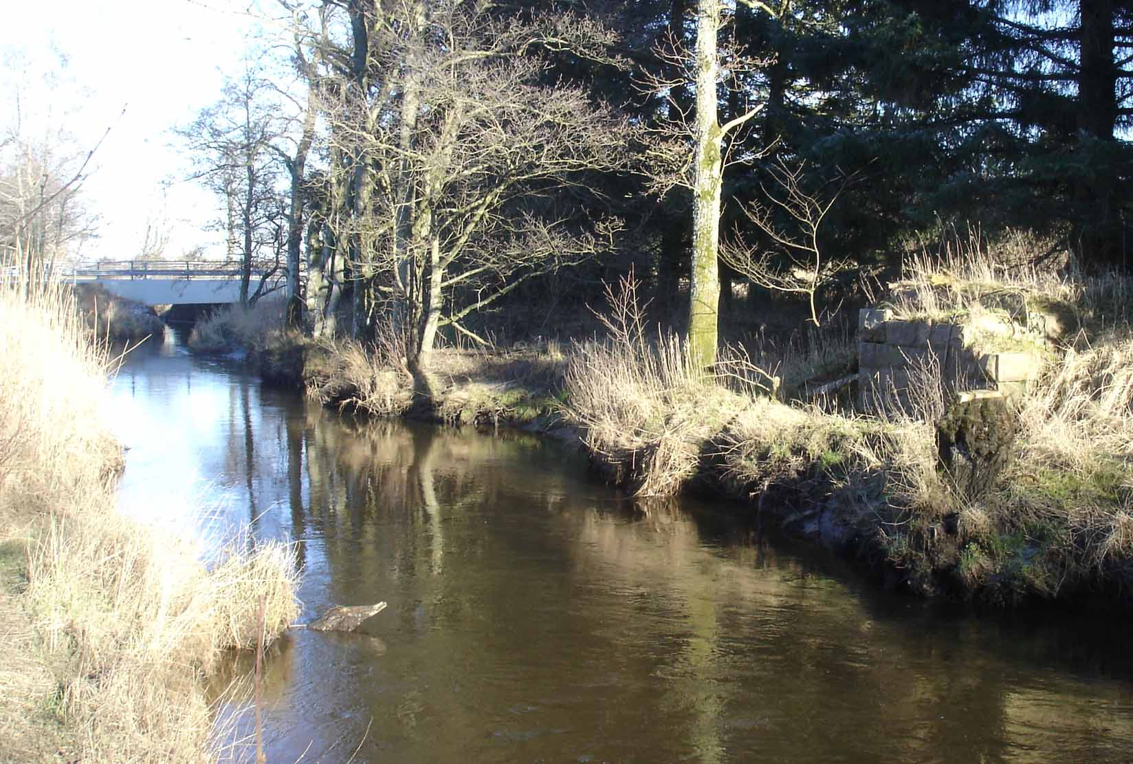 Elling Å med Skagensbanens oprindelige brofæste th. i billedet